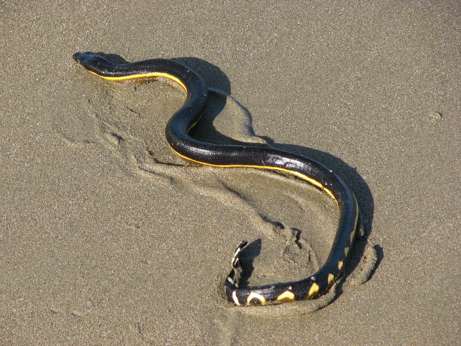 Pelamis platura